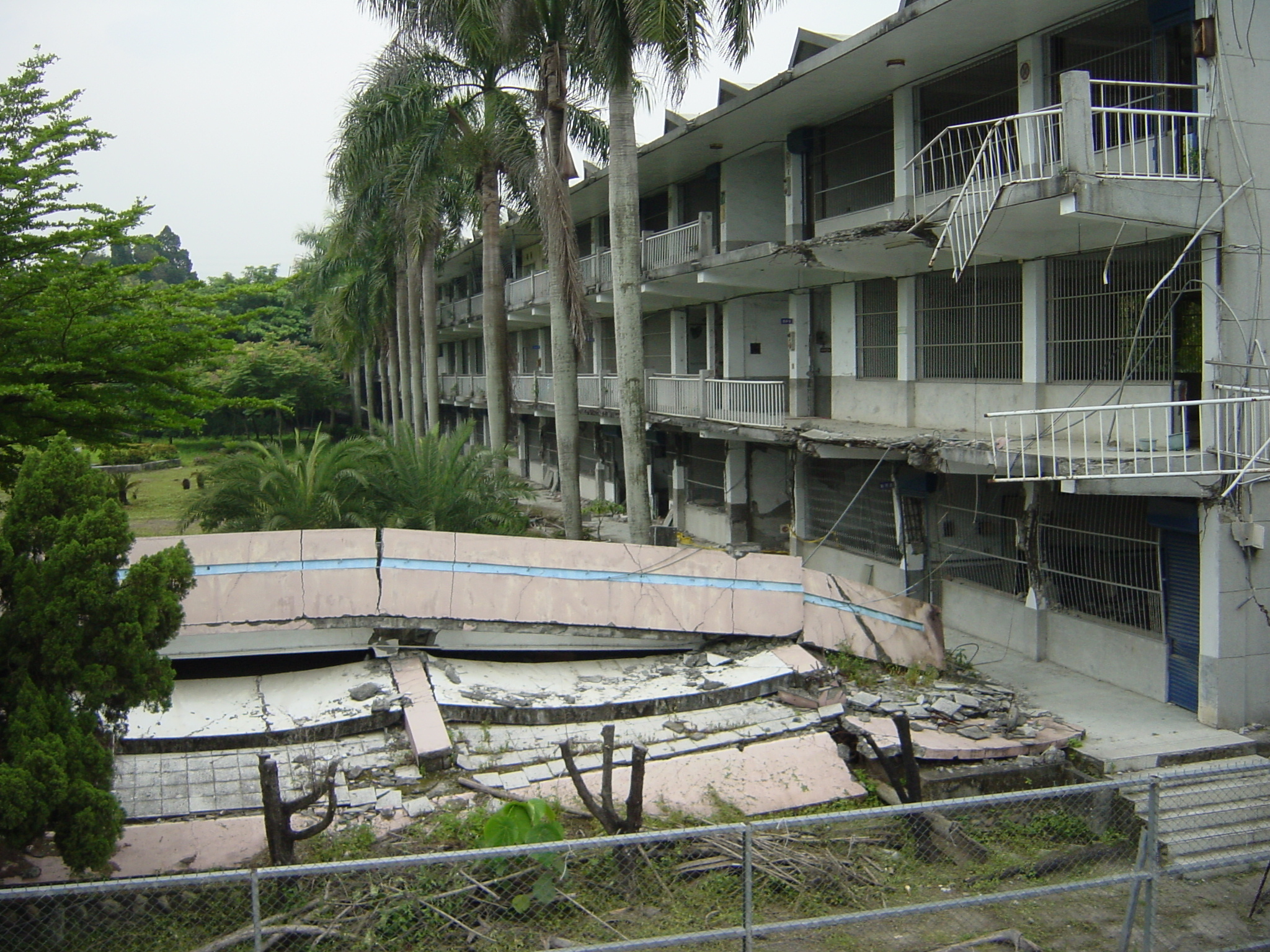 臺中縣霧峰鄉原光復國中校舍。